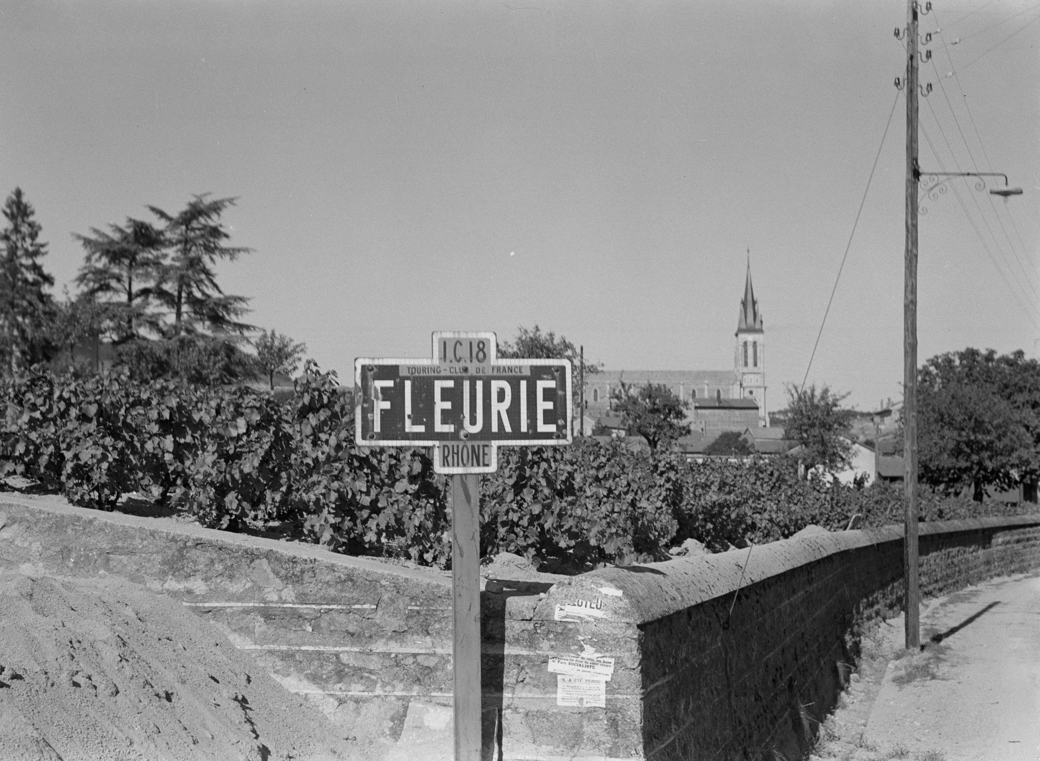 Collectie / Archief : Fotocollectie Van de Poll Reportage / Serie : Wijnstreken - Beaujolais Beschrijving : Naambord markeert de weg naar Fleurie Datum : 1935 Locatie : Frankrijk Trefwoorden : wijnbouw Fotograaf : Poll, Willem van de Auteursrechthebbende : Nationaal Archief Materiaalsoort : Glasnegatief Nummer archiefinventaris : bekijk toegang 2.24.14.02 Bestanddeelnummer : 191-0328